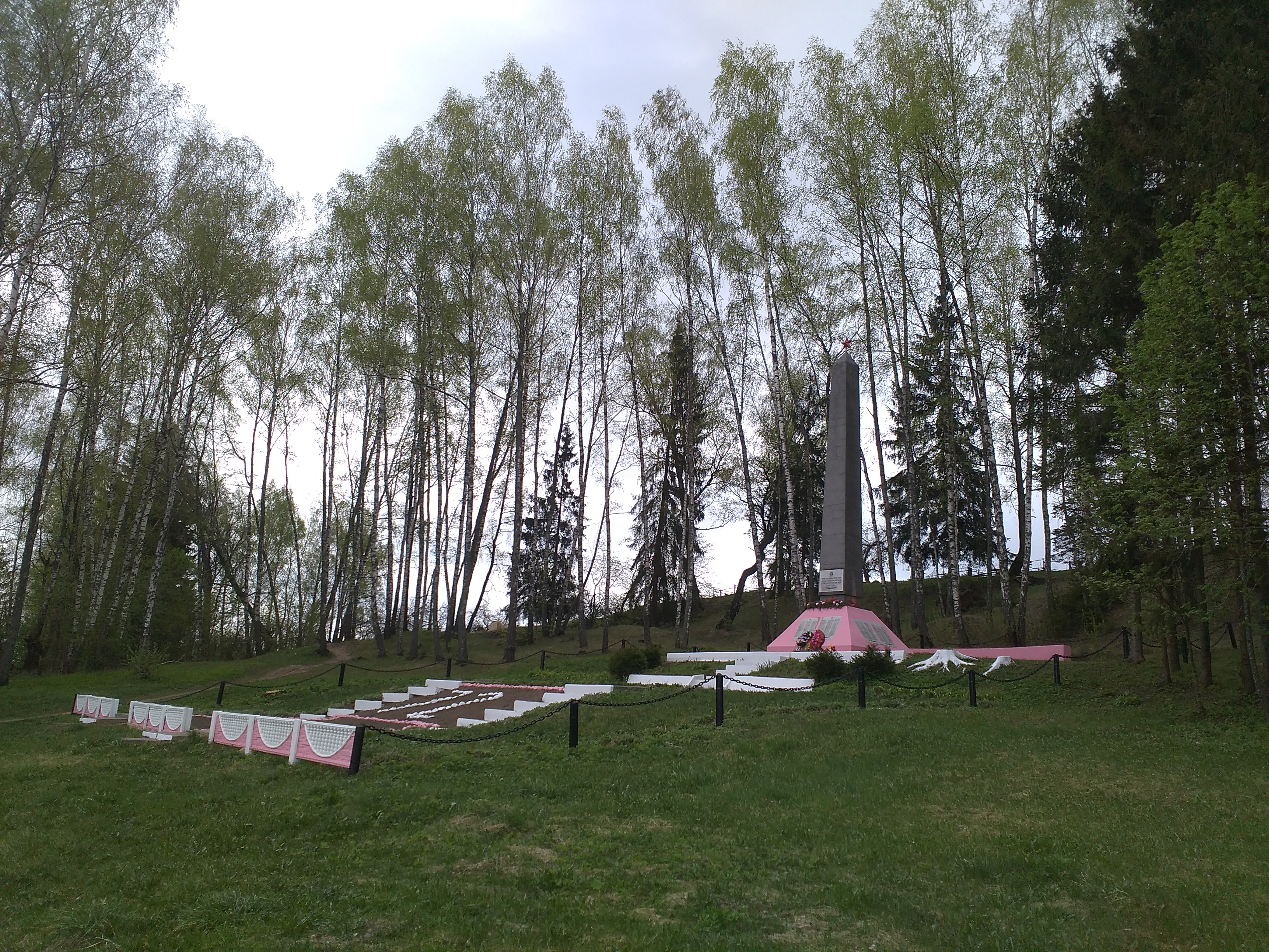 Мемориал 2МВ в Трилесино